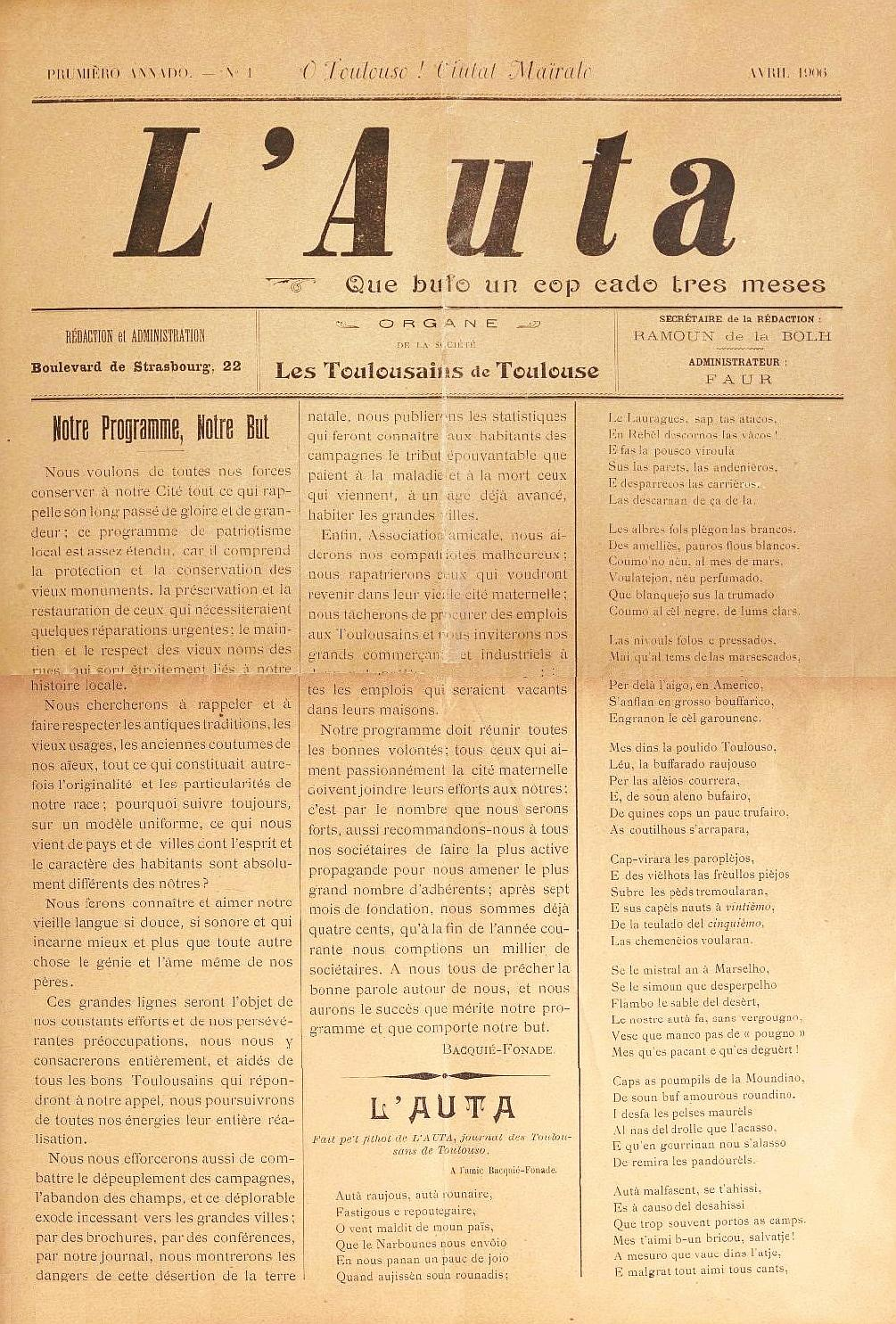 L'Auta, n°1, avril 1906 ("que bufo un cop cado més" : organe de la société des Toulousains de Toulouse et amis du vieux Toulouse).